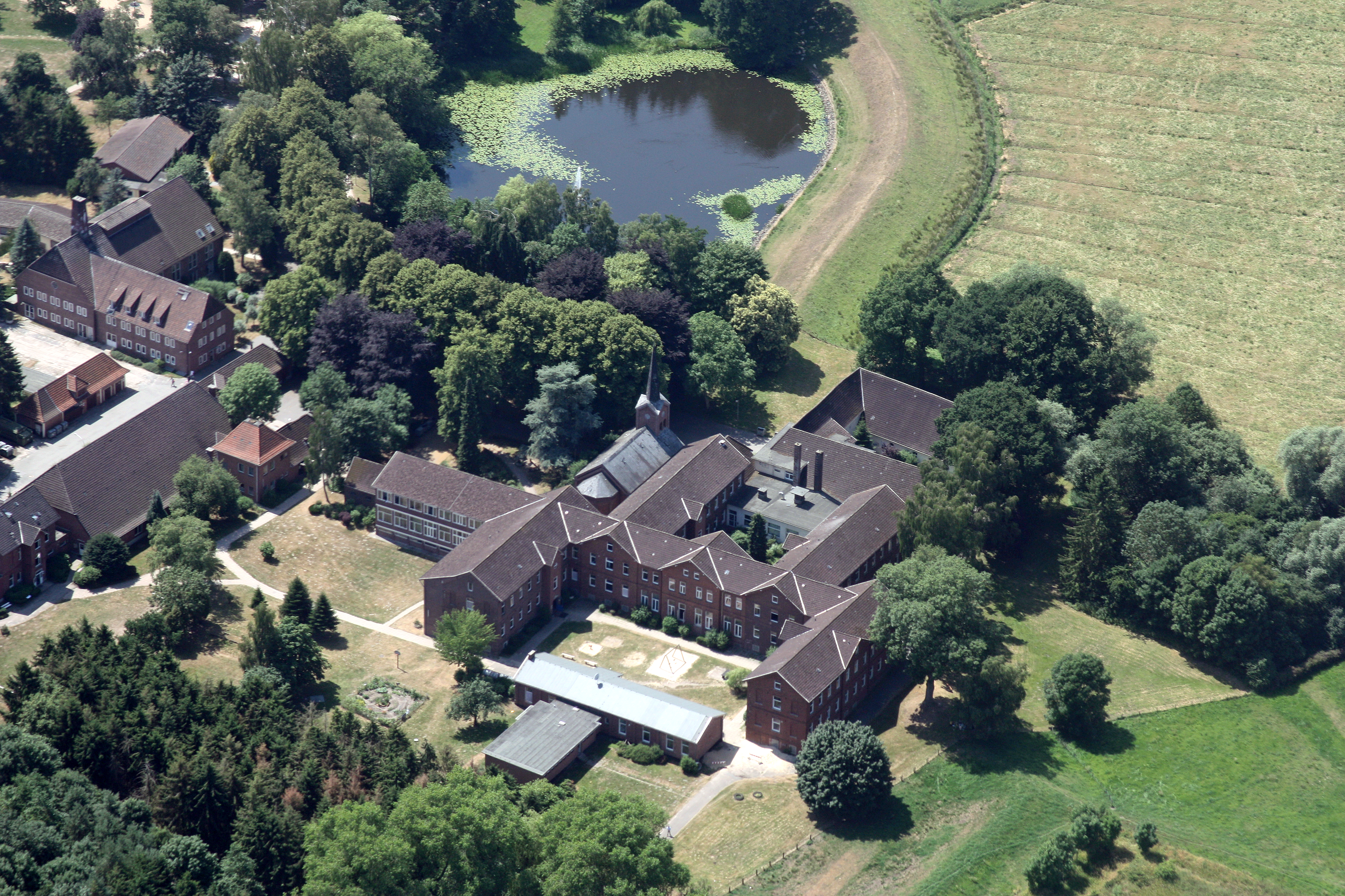 Anlage des ehemaligen Klosters Blankenburg (Flug über Oldenburg; von Wilhelmshaven kommend nach Hatten; Flughöhe 500 m = 1500 ft; Juli 2010)